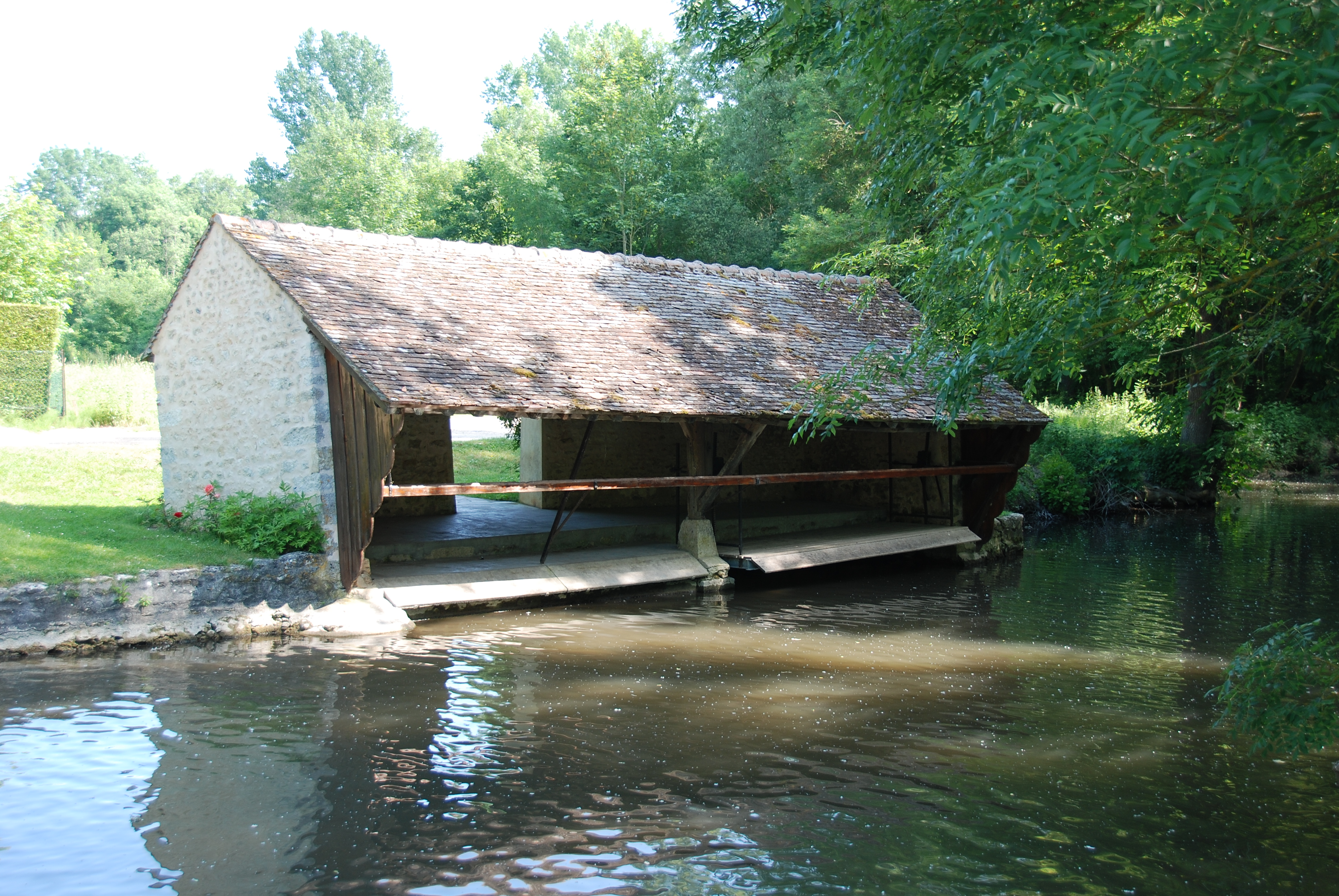 Le lavoir sur l'Essonnes